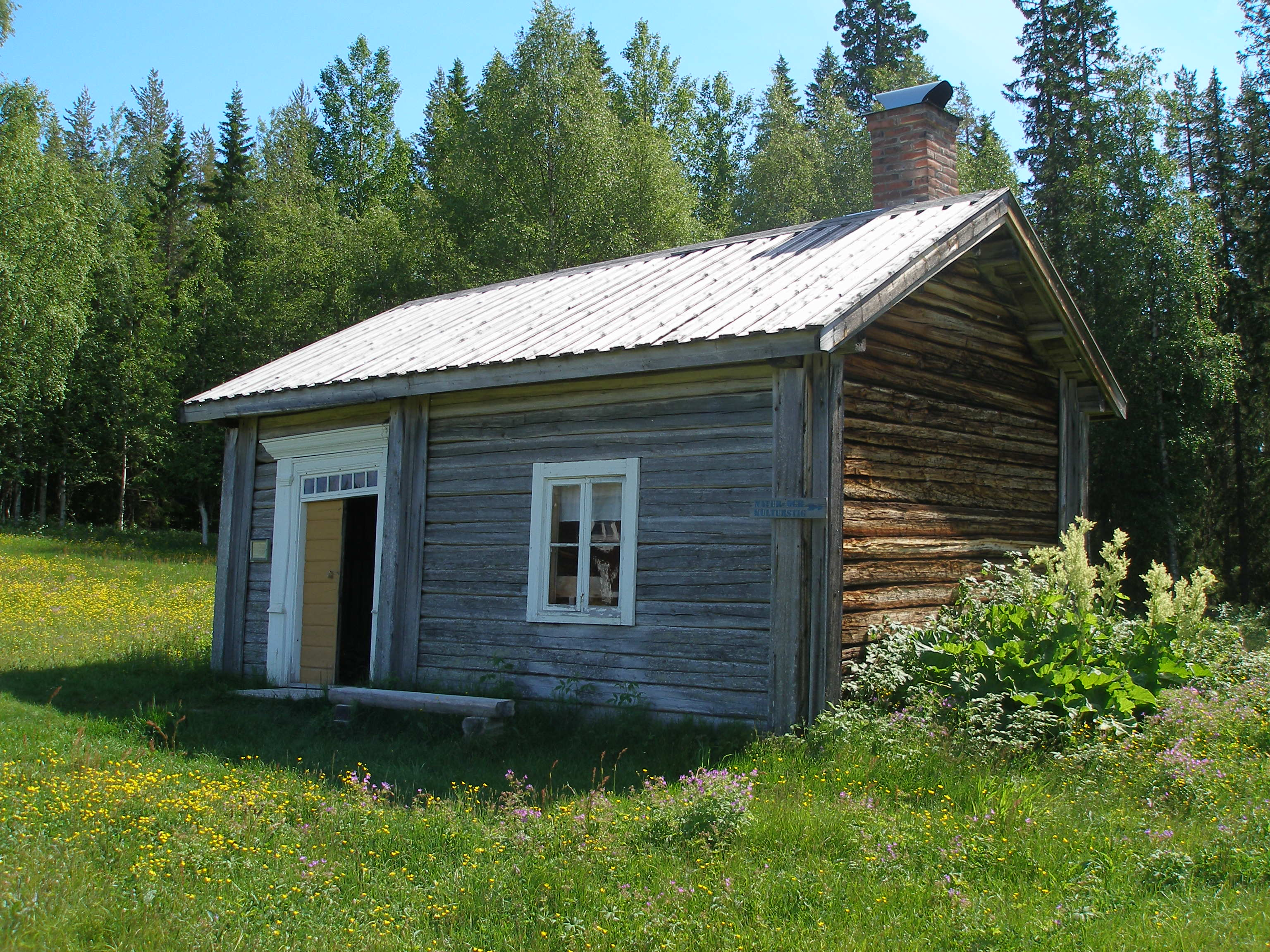 Bagarstuga i Rismyrliden, Skellefteå kommun.